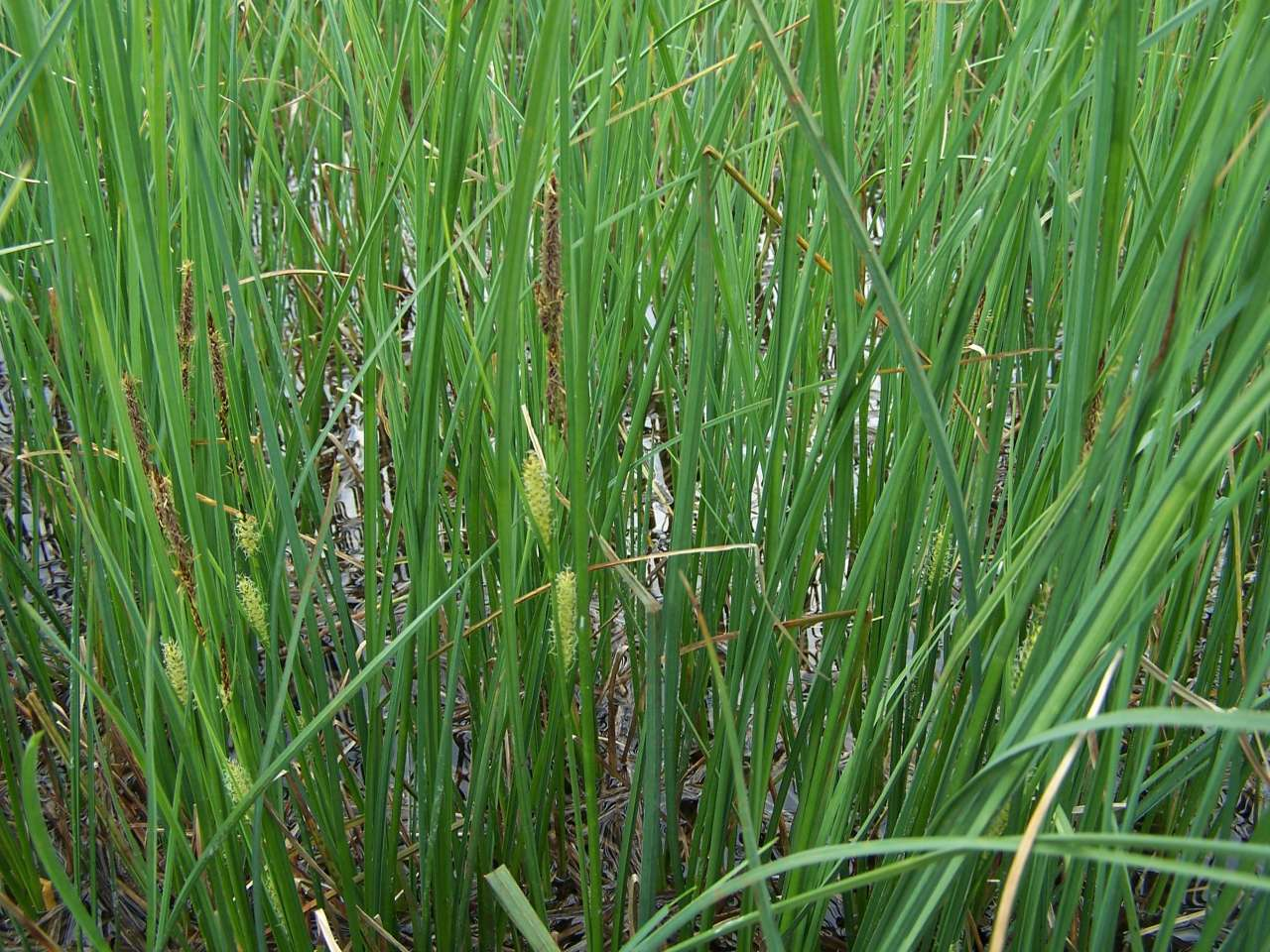 Carex rostrata (pl. turzyca dzióbkowata), habitat: Tatra Mountains, Dolina Gąsienicowa, Staw Litmanowy Gąsienicowy